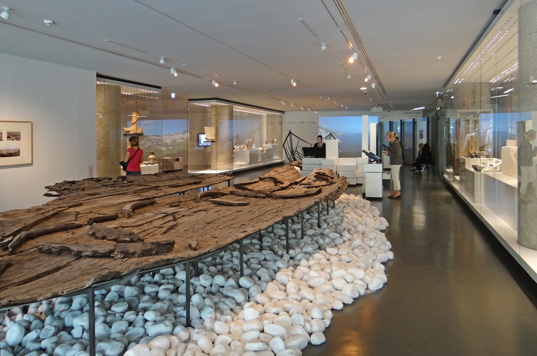 Présentation de l'épave JV7 JV 7 : Petit navire de commerce de la fin du VIème siècle avant J.-C La Ville de Marseille possède une collection exceptionnelle de six navires datant de la fin du VIème siècle avant J.-C au IIIème siècle après J.-C. Cinq de ces épaves ont été trouvées lors de la fouille archéologique de la place Jules Verne, en 1992. Le musée d’Histoire de Marseille a été remarquablement rénové au niveau de la muséographie, des salles et services annexes et des dispositifs multimédias numériques, à l'occasion de la grande manifestation Marseille-Provence 2013. Il présente sur 3.500 m2 des objets exceptionnels, de la préhistoire à aujourd'hui, en particulier les restes de navires grecs et romains, découverts dans les fouilles du quartier du centre Bourse et de la place Jules Verne, des maquettes de Marseille à différentes époques, de nombreuses archives et oeuvres d'art... A l'extérieur du musée, un jardin des vestiges a été aménagé sur le site de la "corne" de l'ancien port antique (voir la maquette du Lacydon). Le site du musée d'Histoire de Marseille L'extension numérique du musée d'Histoire de Marseille orbes.mobi/grpmt-innovision_extnum-mhm_plateforme-hm/